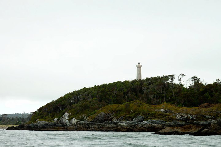 Caleta Inío, Chiloé, Chile.